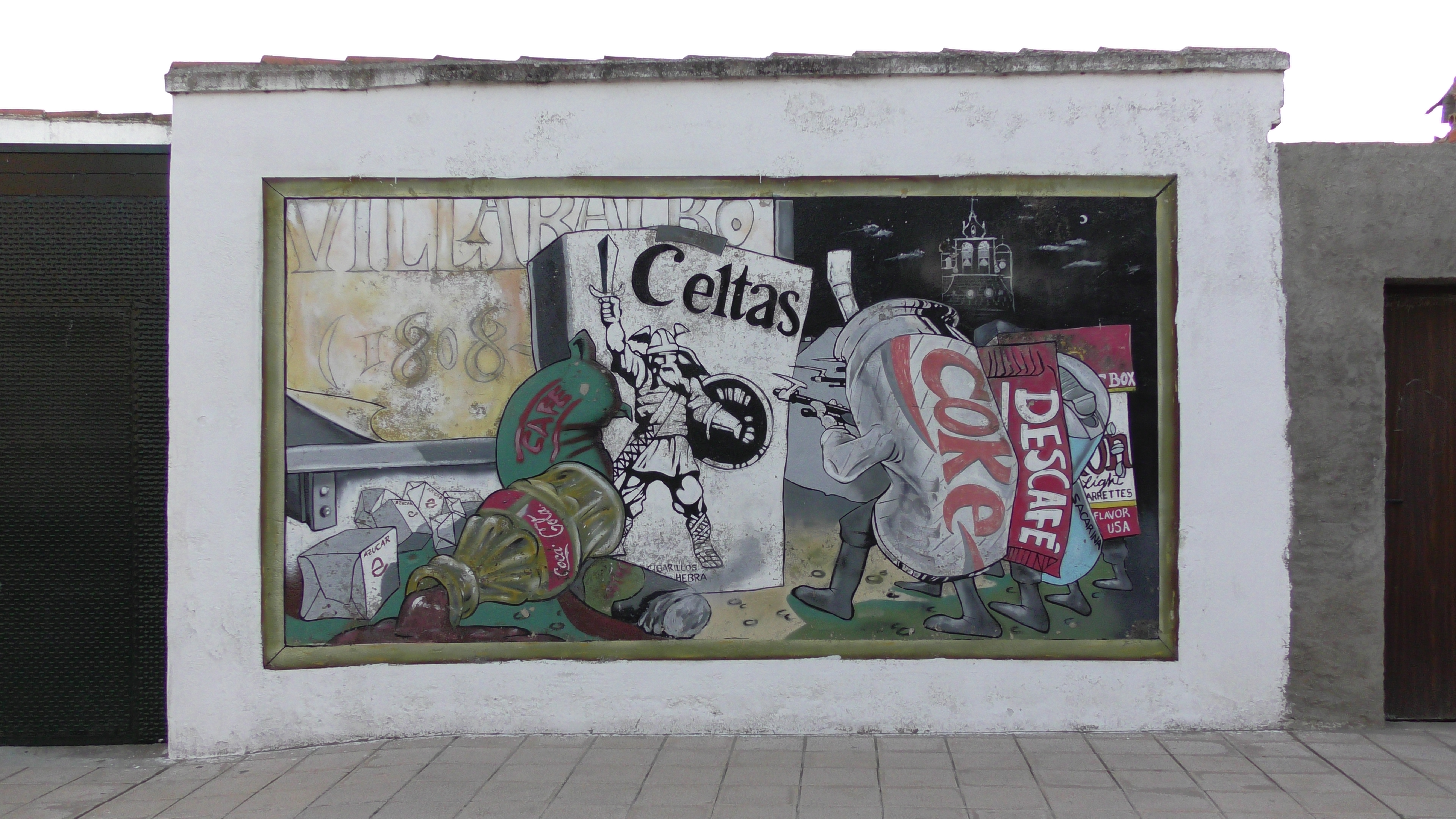 Villaralbo